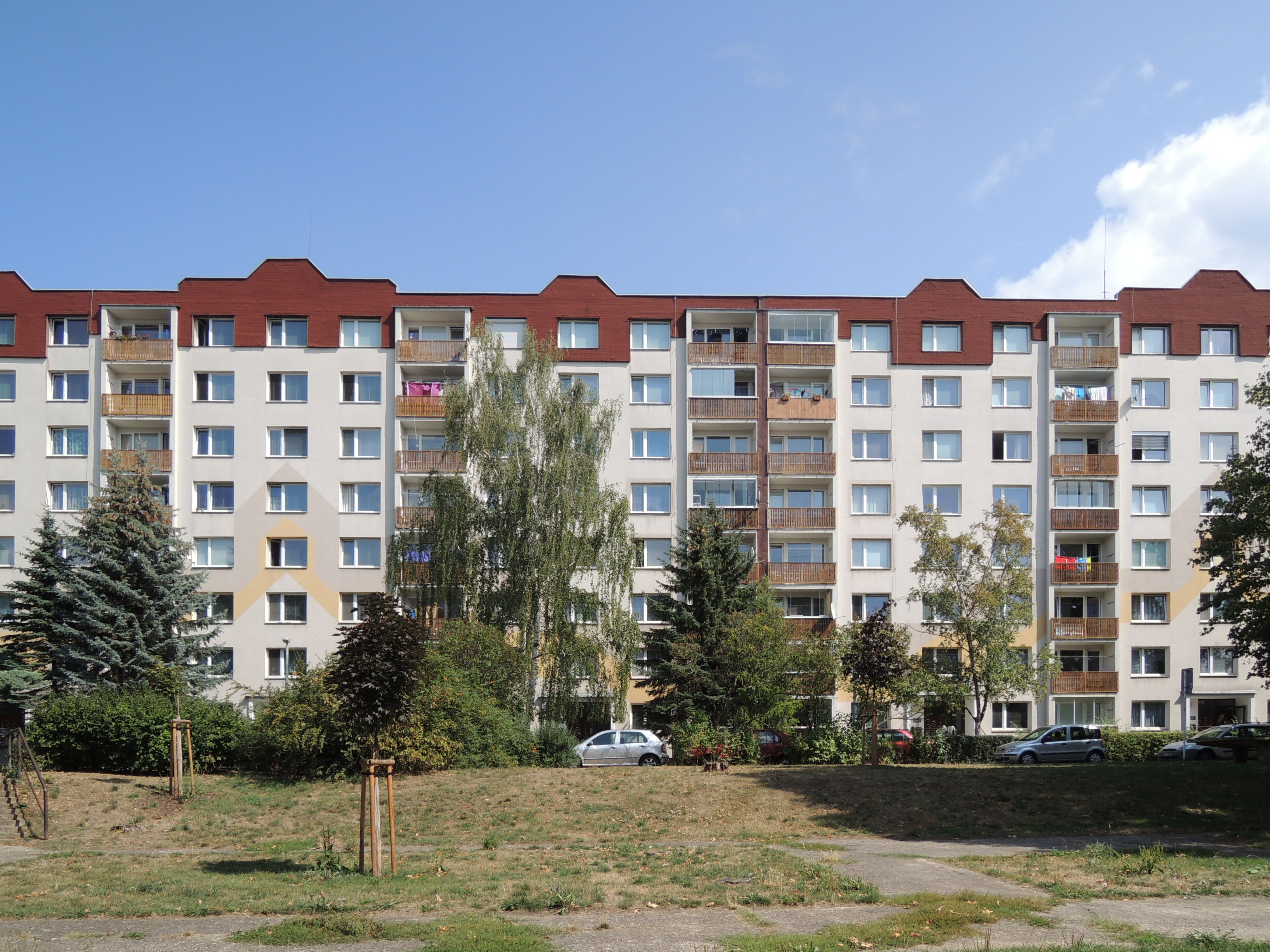 Paneláky v ulici Maková